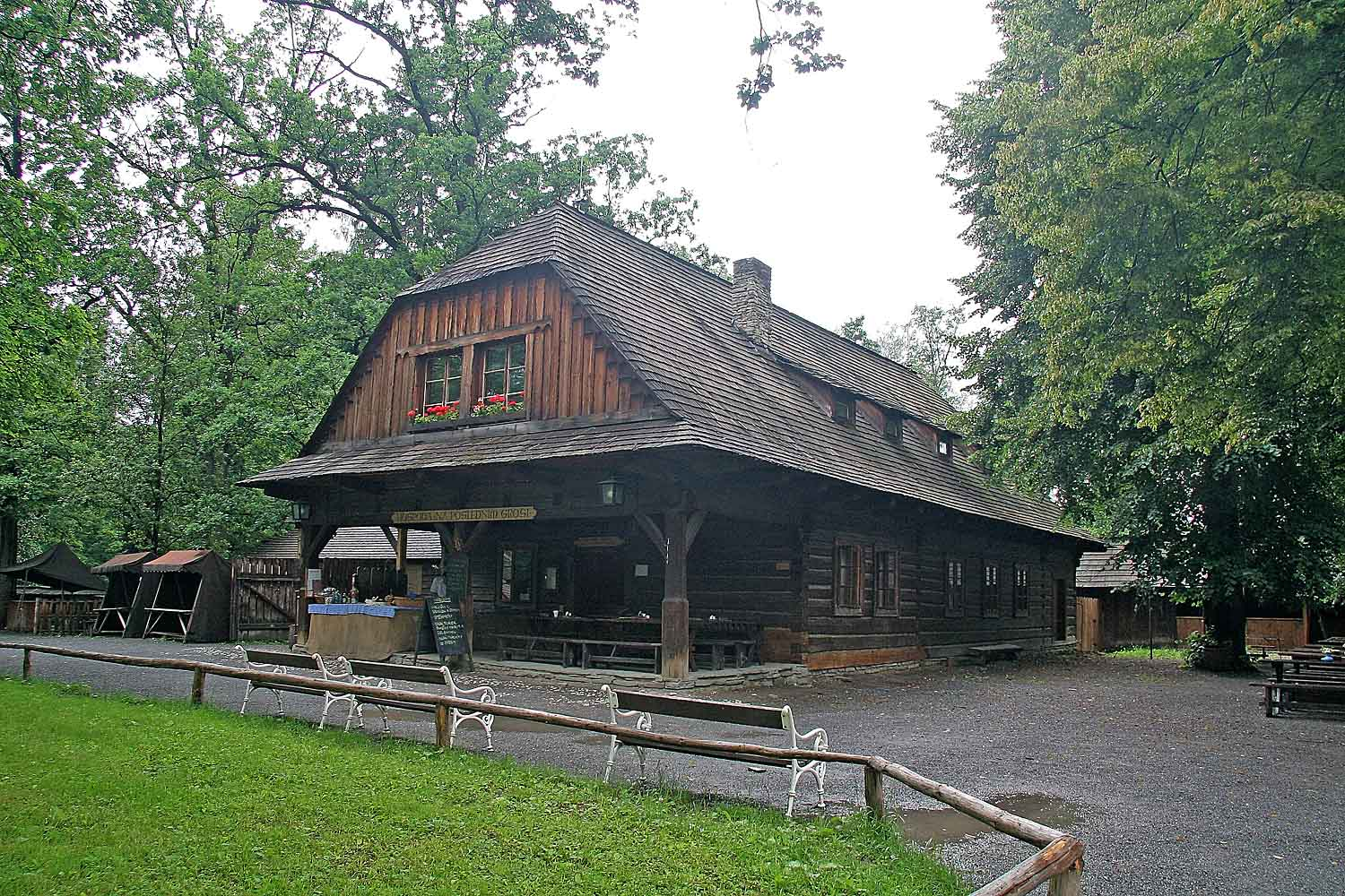 Skanzen Valašké muzeum v přírodě, Valašské městečko, Rožnov pod Radhoštěm, Czech republic Autor: Prazak date:30. 6. 2006